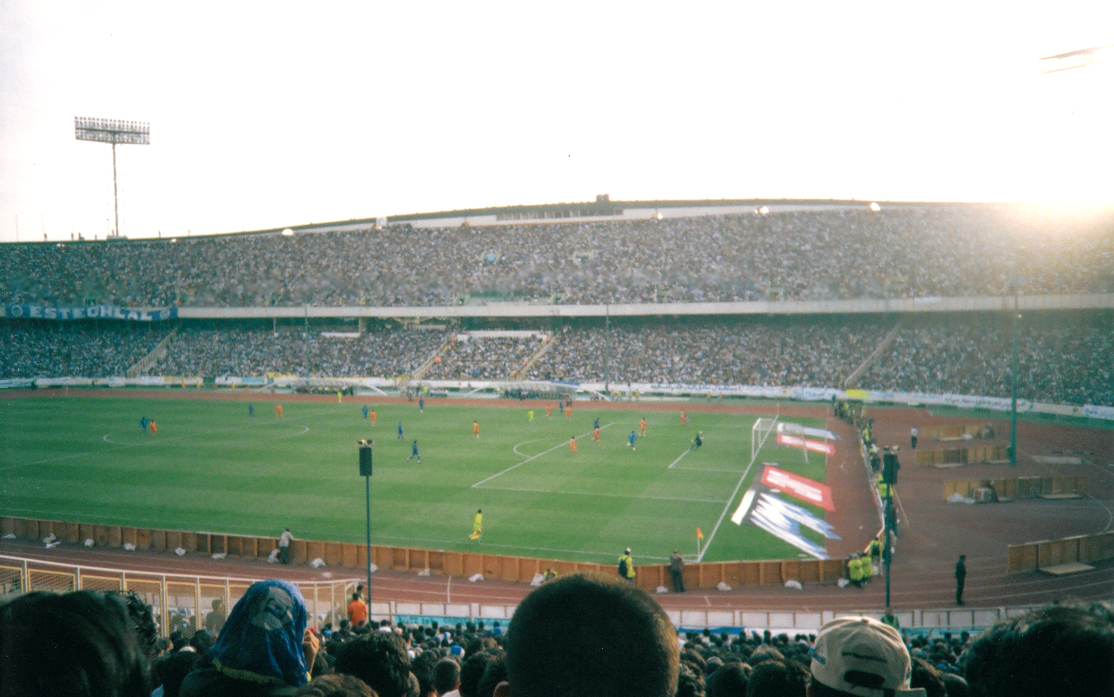 بازی استقلال و برق از هفته سی‌ام مسابقات لیگ برتر فصل ۱۳۸۴-۸۵